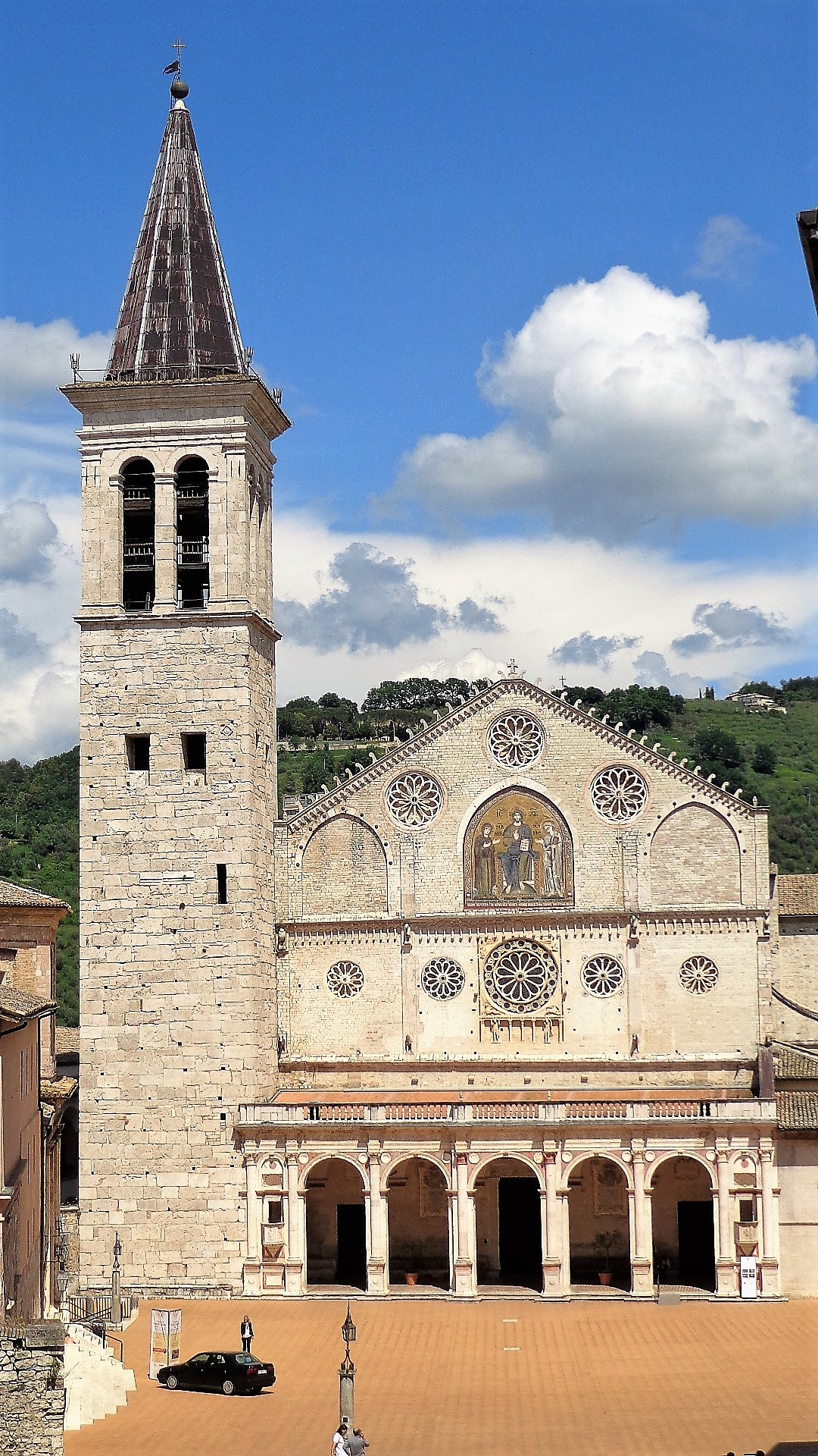 Facciata